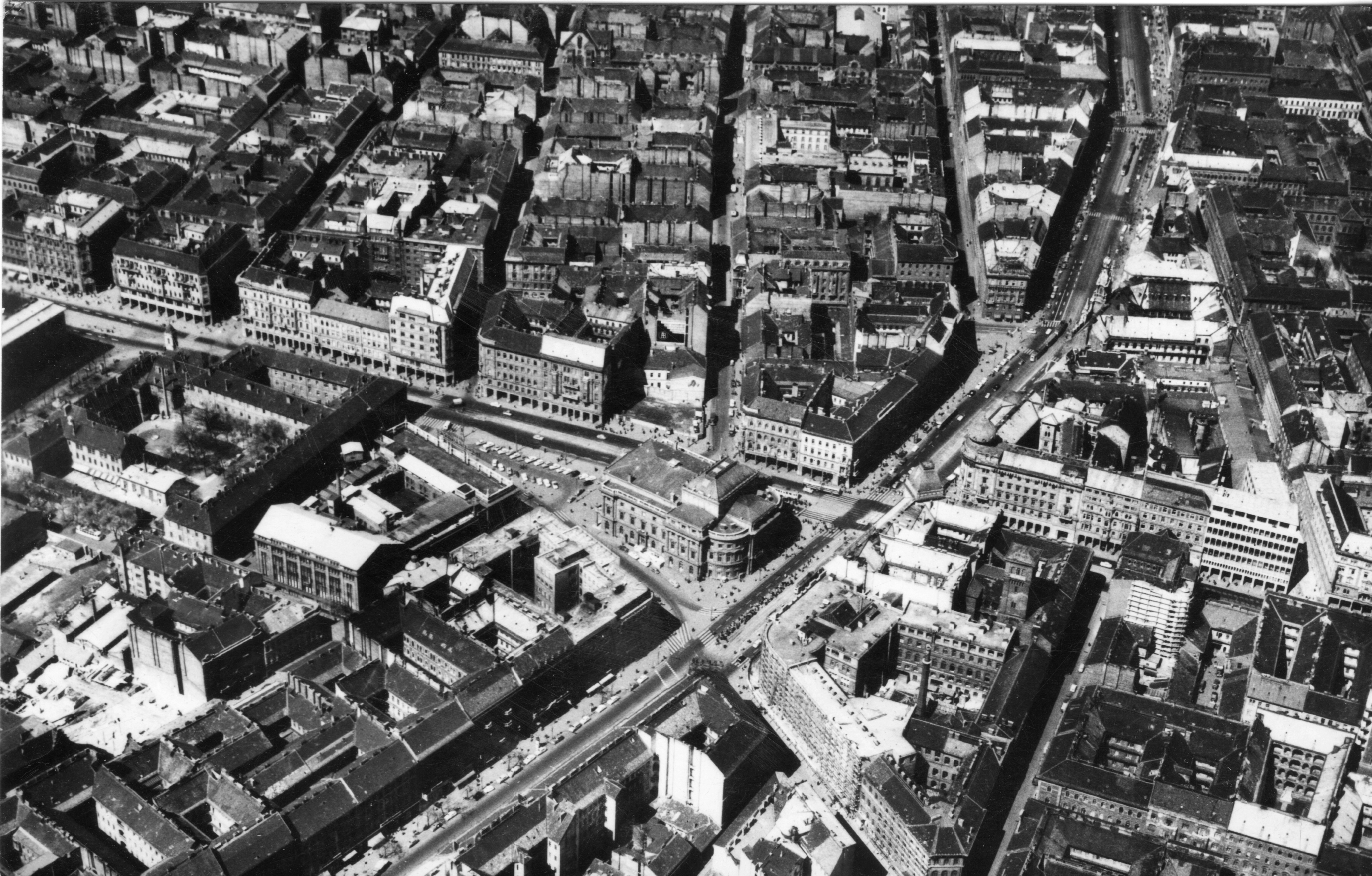 légifotó a Blaha Lujza tér, Nemzeti Színház környékéről. Location: Hungary, Budapest VII., Budapest VIII. Tags: picture, cityscape, Budapest Title: légifotó a Blaha Lujza tér, Nemzeti Színház környékéről.